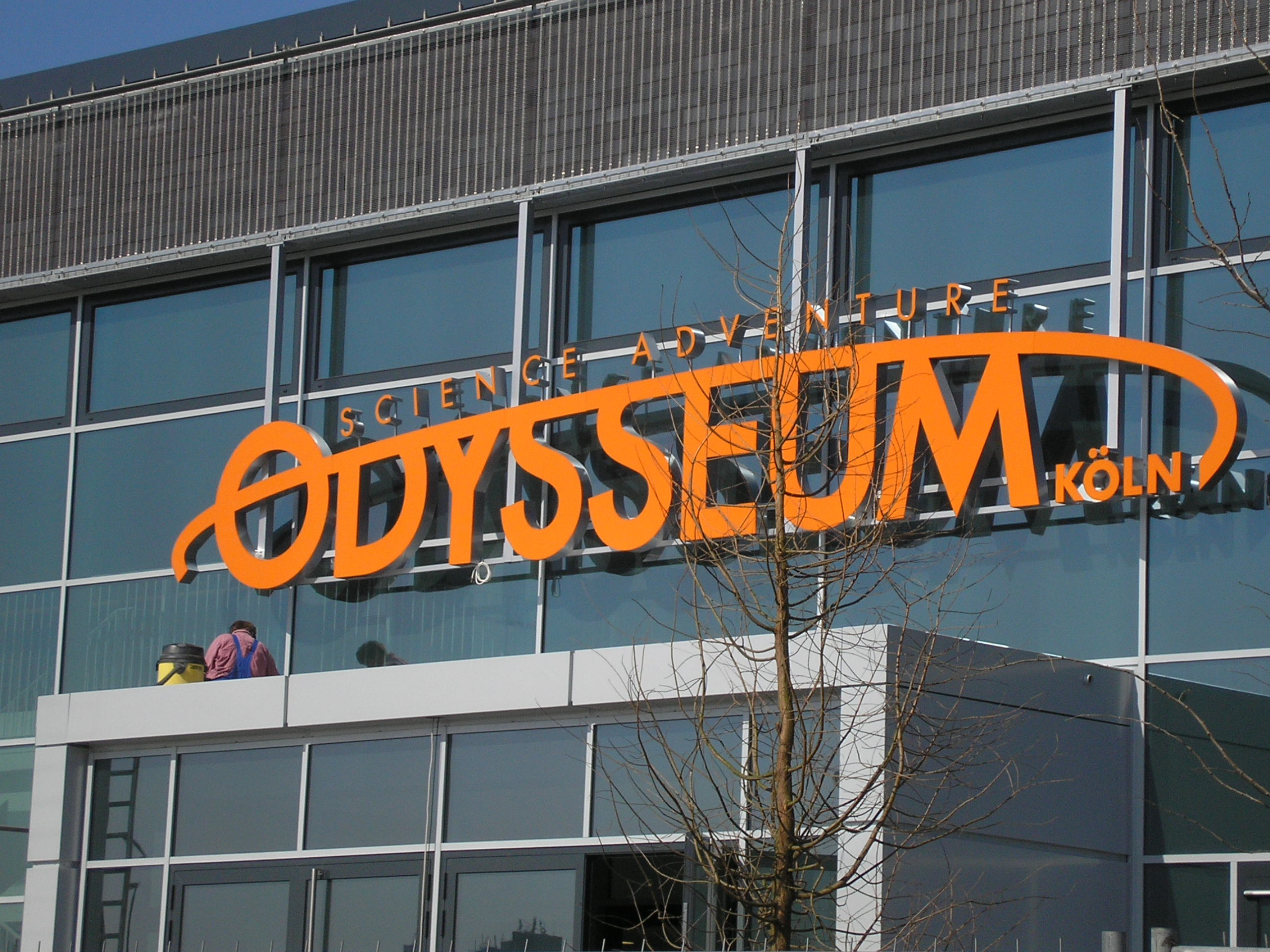 Odysseum in Köln-Kalk, zwei Wochen vor der Eröffnung